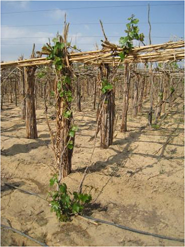 Pergola Nil Fluss